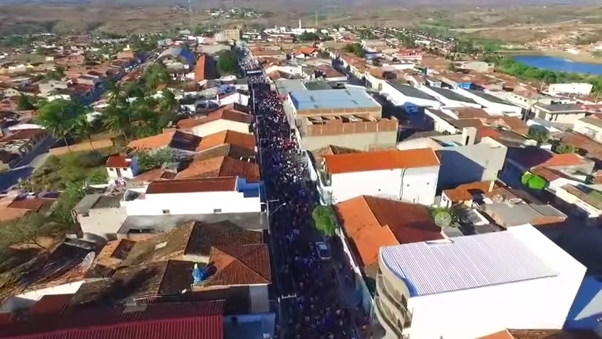 Arara pb